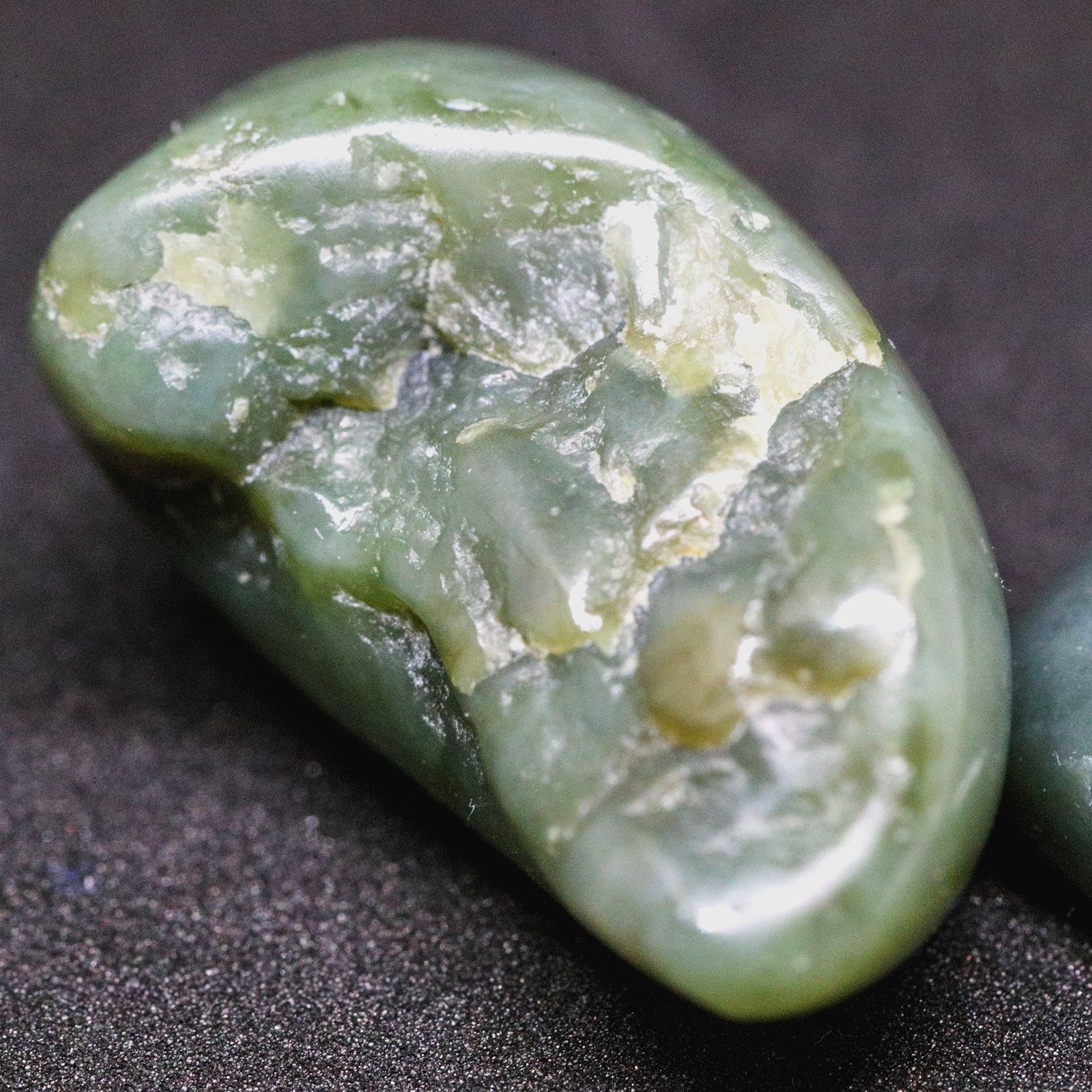 新潟県糸魚川市で採取された軟玉（鑑定：フォッサマグナミュージアム学芸員）